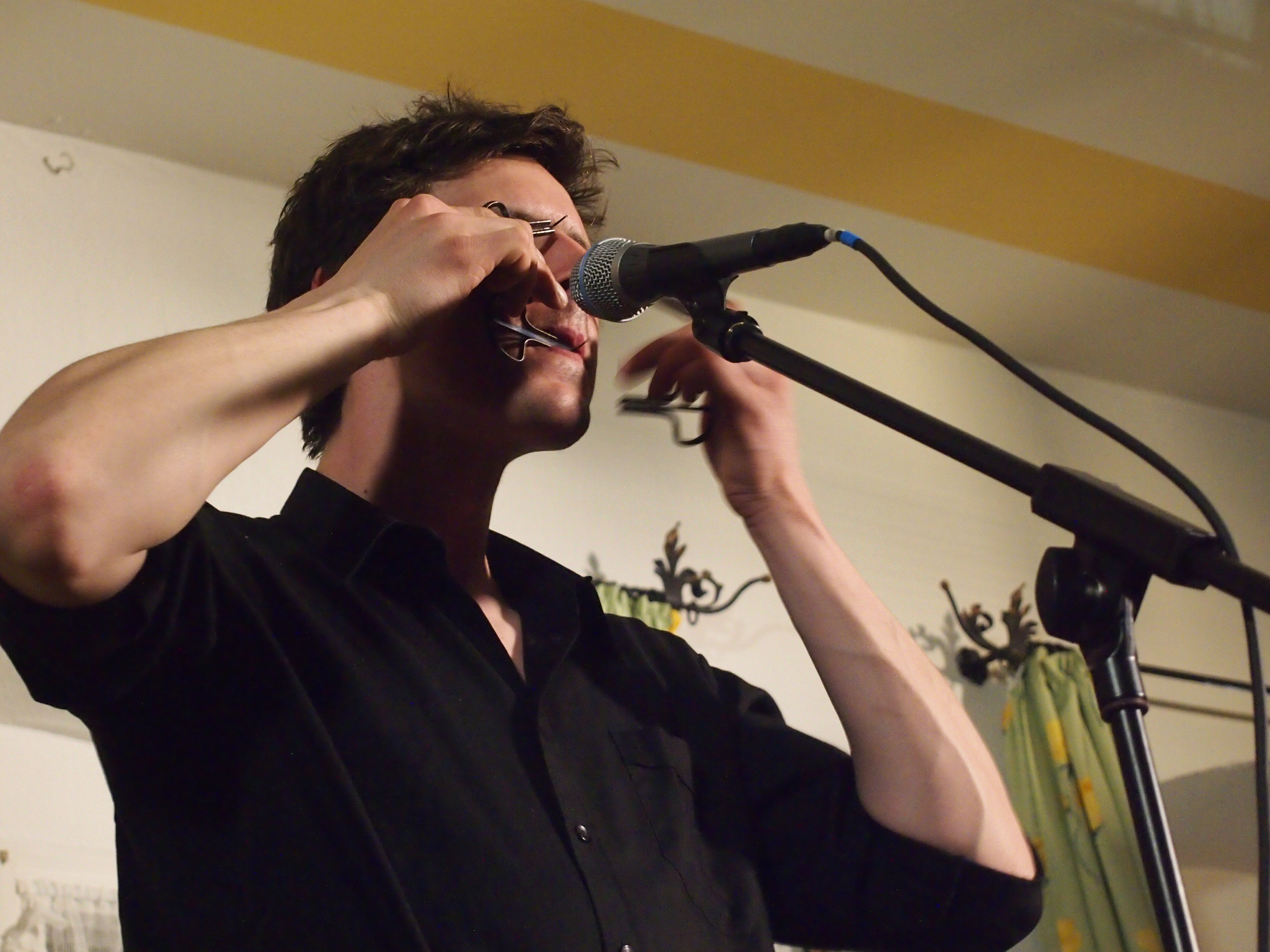 Michael von Mücke mit Maultrommeln, Konzert der Gruppe Kofelgschroa im Gasthof Stern in Unterammergau am 14. April 2013